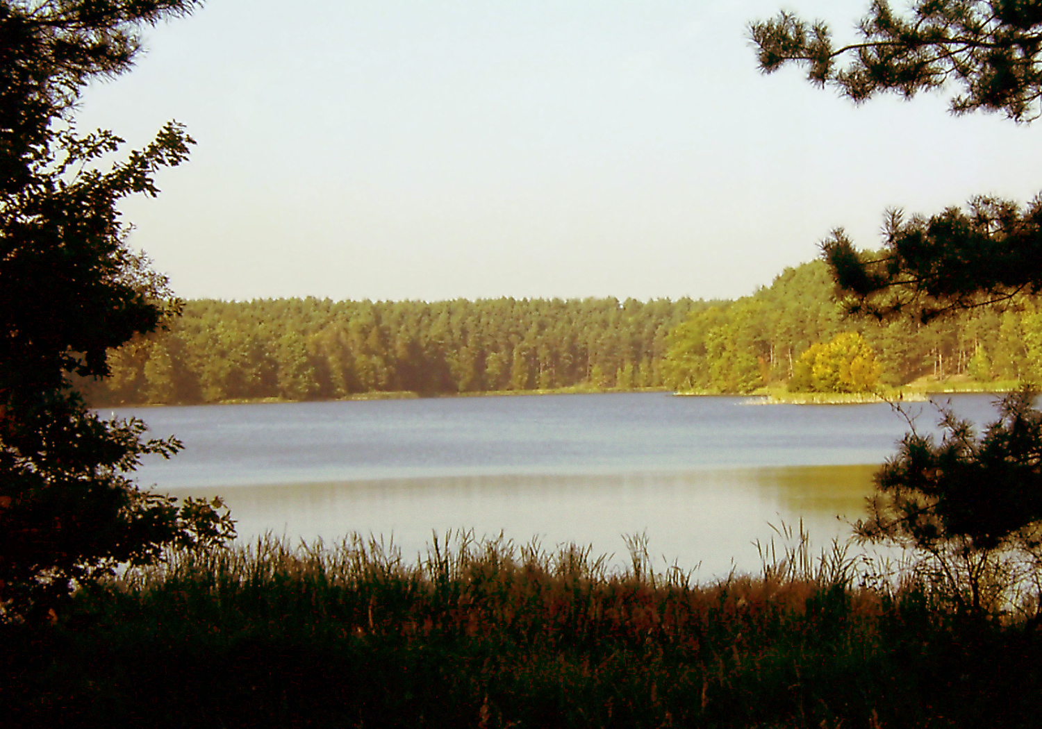 Puszcza Notecka, Jez. Cegliniec (Notecka Forest, Lake Cegliniec)